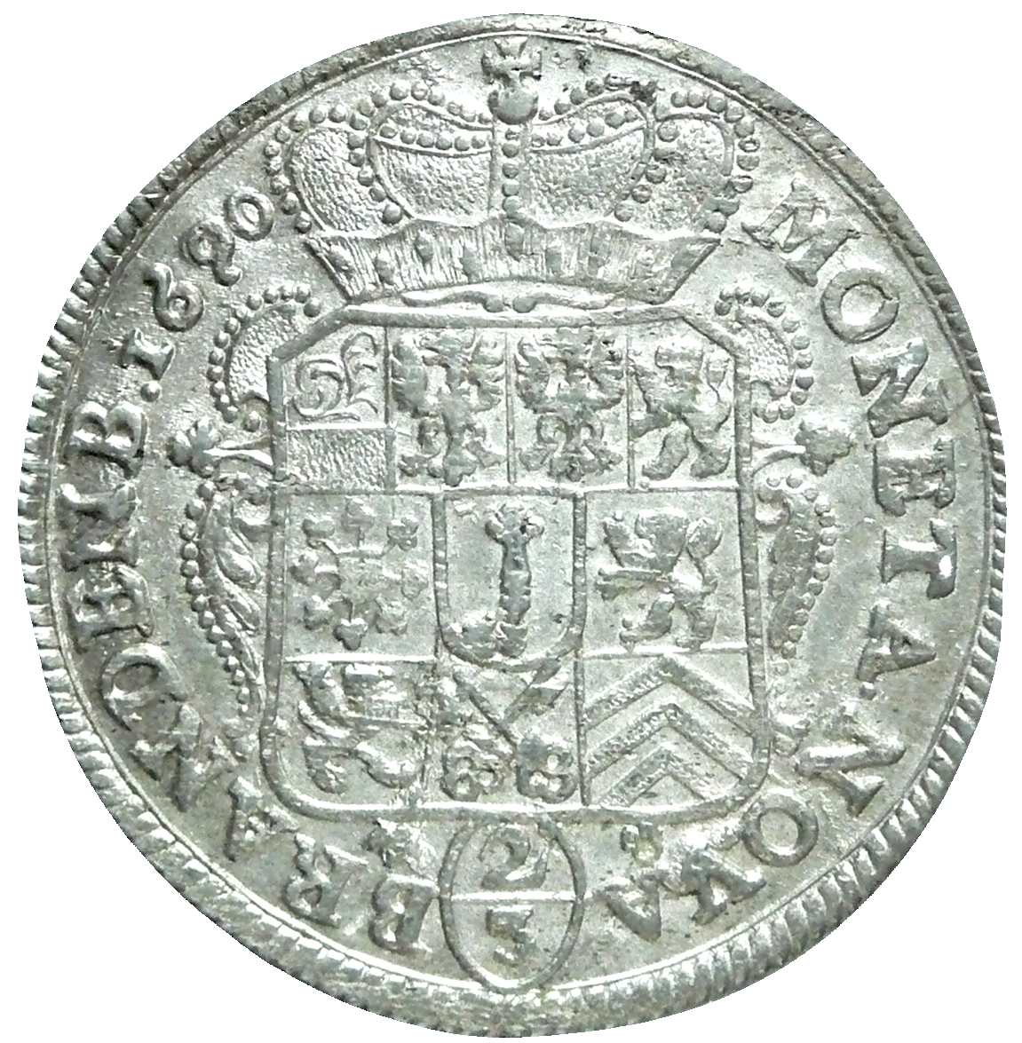 Zweidritteltaler (Gulden) 1690 Kurfürstliche Markgrafschaft Brandenburg / Herzogtum Minden Friedrich III. Kurfürst (09.05.1688-18.01.1701) Prägung im 12-Taler-Münzfuß von Leipzig, 18 Stück auf die feinen Mark Münzstätte Minden, Münzmeister Bastian Hille im Amt 1682-1706 Gewicht: 17,58 g Durchmesser: 36,97-38,13 mm Dicke: 1,85 mm unter Herzogskrone verziertes halbrundes Wappenschild mit 9 Wappen Regalienschild, Brandenburg, Pommern,…/ Kleve, Jülich/ Berg, Minden, Ravensberg) und dem Herzschild mit dem Wappen der Kurwürde (Zepter), unter dem Wappenschild in ovalem Kreis Wertbezeichnung 2/3, die Umschrift unterbrechend, Kennzeichnung der Münze als neue Landesmünze durch Umschrift rechts beginnend MONETA NOVA BRANDENB. (Neue Münze Brandenburgs) und Jahreszahl